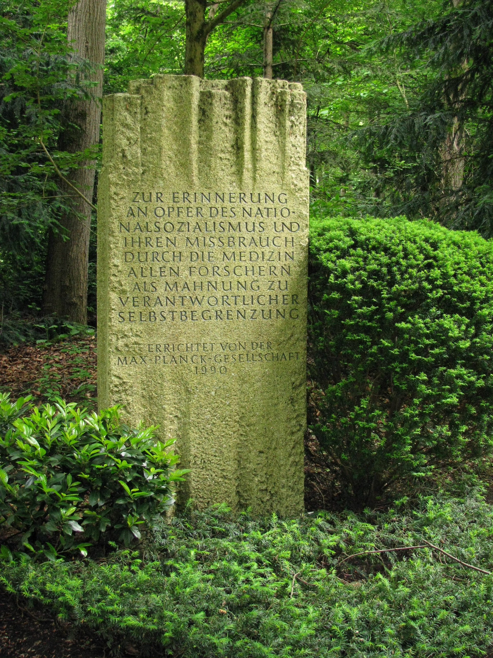 Gedenkstein der Max-Plank-Gesellschaft im Münchner Waldfriedhof.